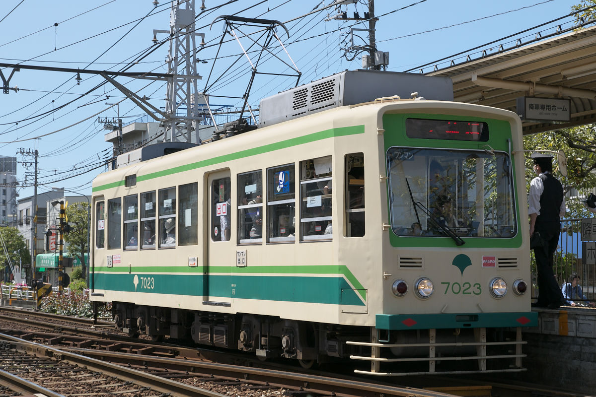 都電7000形（7023号）、荒川車庫前。